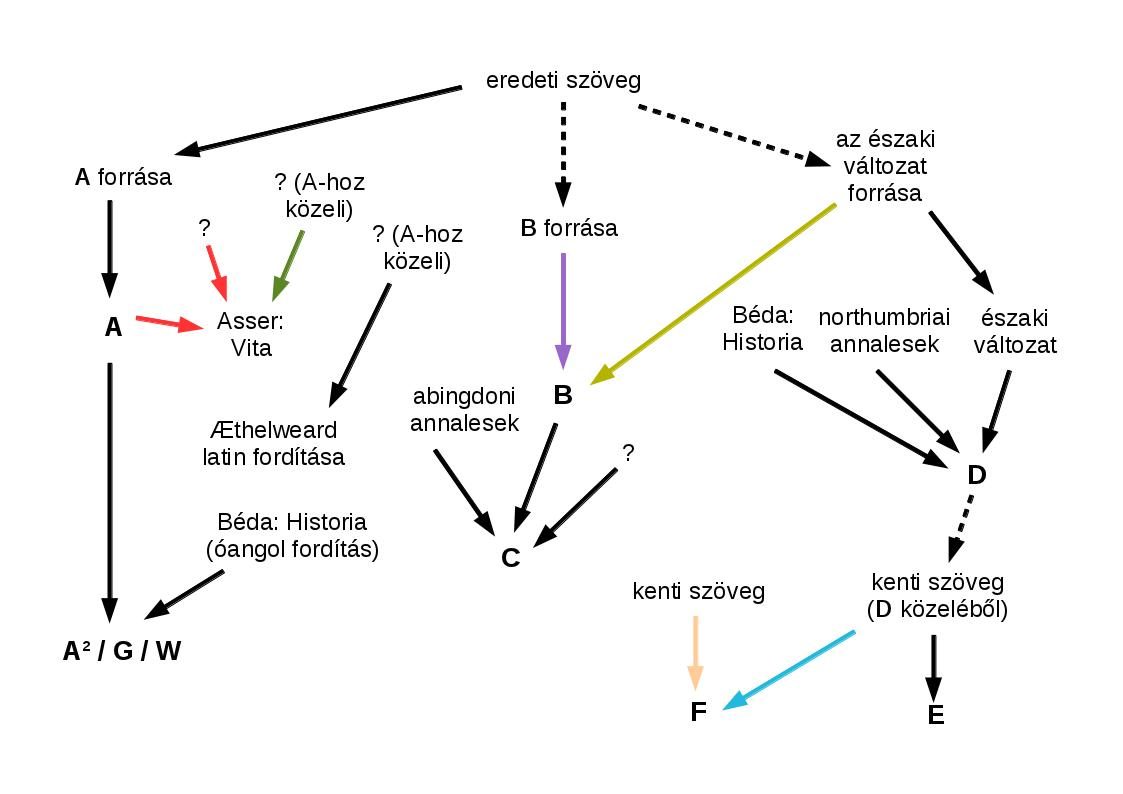 Az Angolszász krónika kéziratai és forrásai közötti feltételezett kapcsolatok, a szócikk szövege alapján.